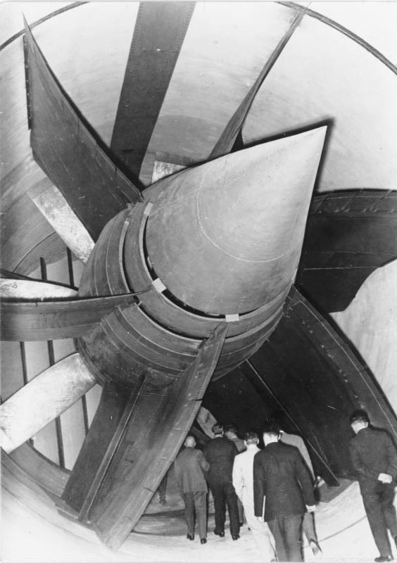 Interessante Aufnahmen in der Deutschen Versuchsanstalt für Luftfahrt in Bln.-Adlershof! Das Gebläse im großen Windkanal der Deutschen Versuchsanstalt. 2700 PS erzeugen den Luftstrom. Ein riesen Propeller von 8 1/2 m. Durchmesser wird durch den Elektromotor angetrieben.